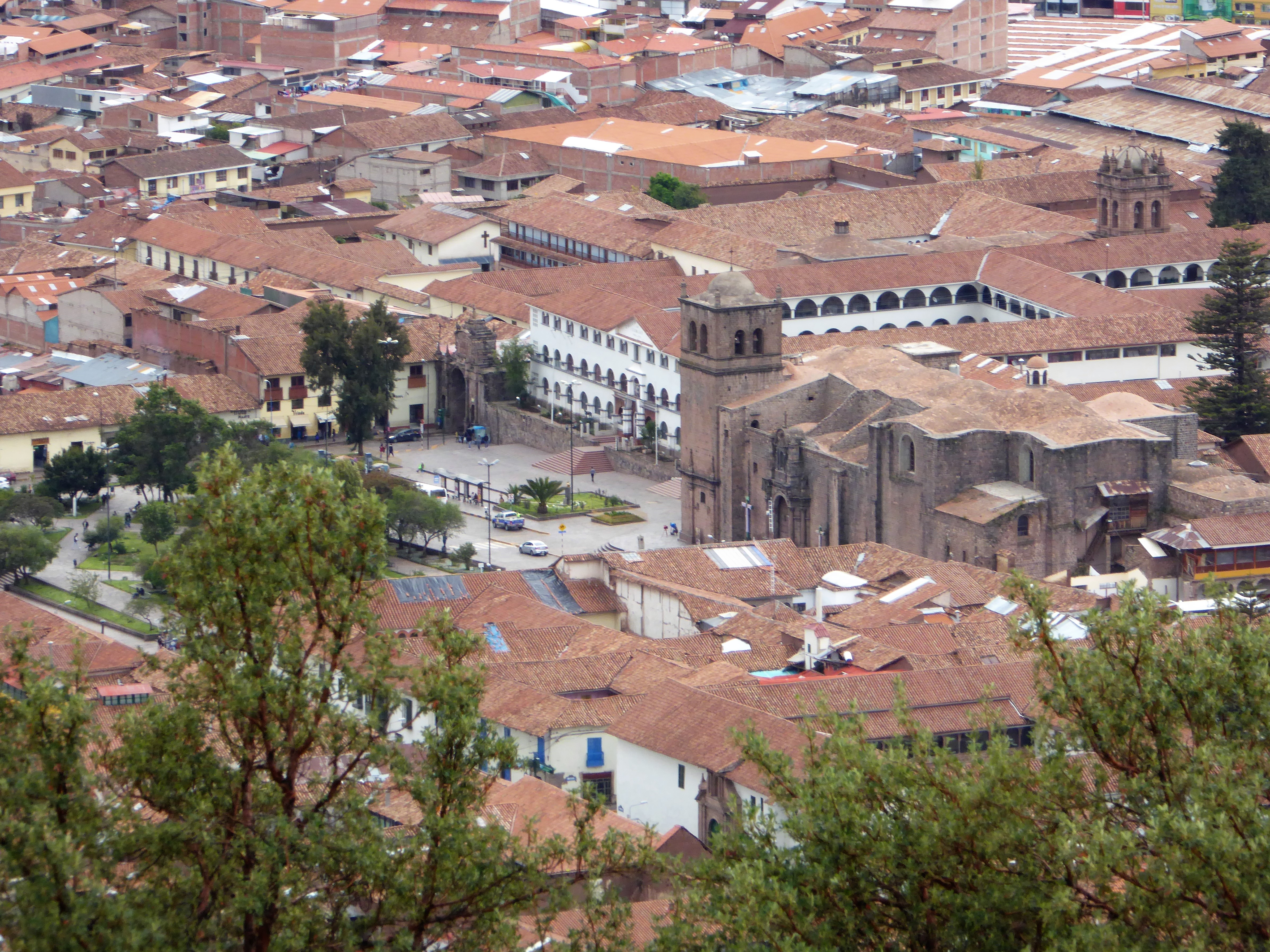 Blick von Sacsayhuamán auf Cusco